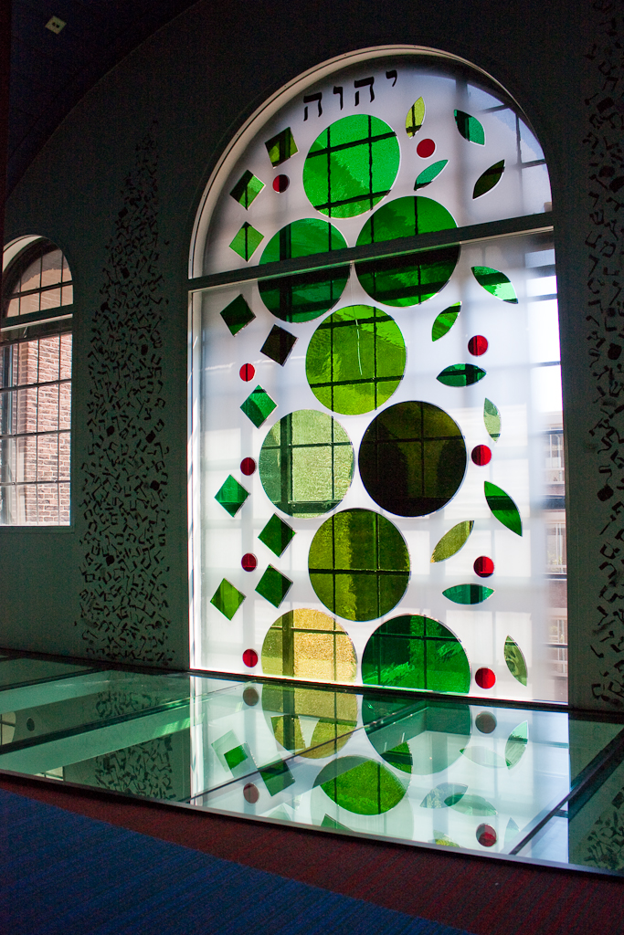 Tree of Life by Eli Content Middle frame of a set of three leaded glass windows by the artist Eli Content. This framework is made of matt clear glass with 12 large glass spheres in different shades of green. Around the 12 balls are smaller squares and ovals in various green and small red spheres. Eli Content's thumb print can be seen at the bottom centre. The Tree of Life, or Etz haChayim (עץ החיים) in Hebrew, is a mystical symbol used in the Kabbalah of esoteric Judaism to describe the path to HaShem and the manner in which He created the world ex nihilo (out of nothing). Kabbalists believe the Tree of Life to be a diagrammatic representation of the process by which the Universe came into being.